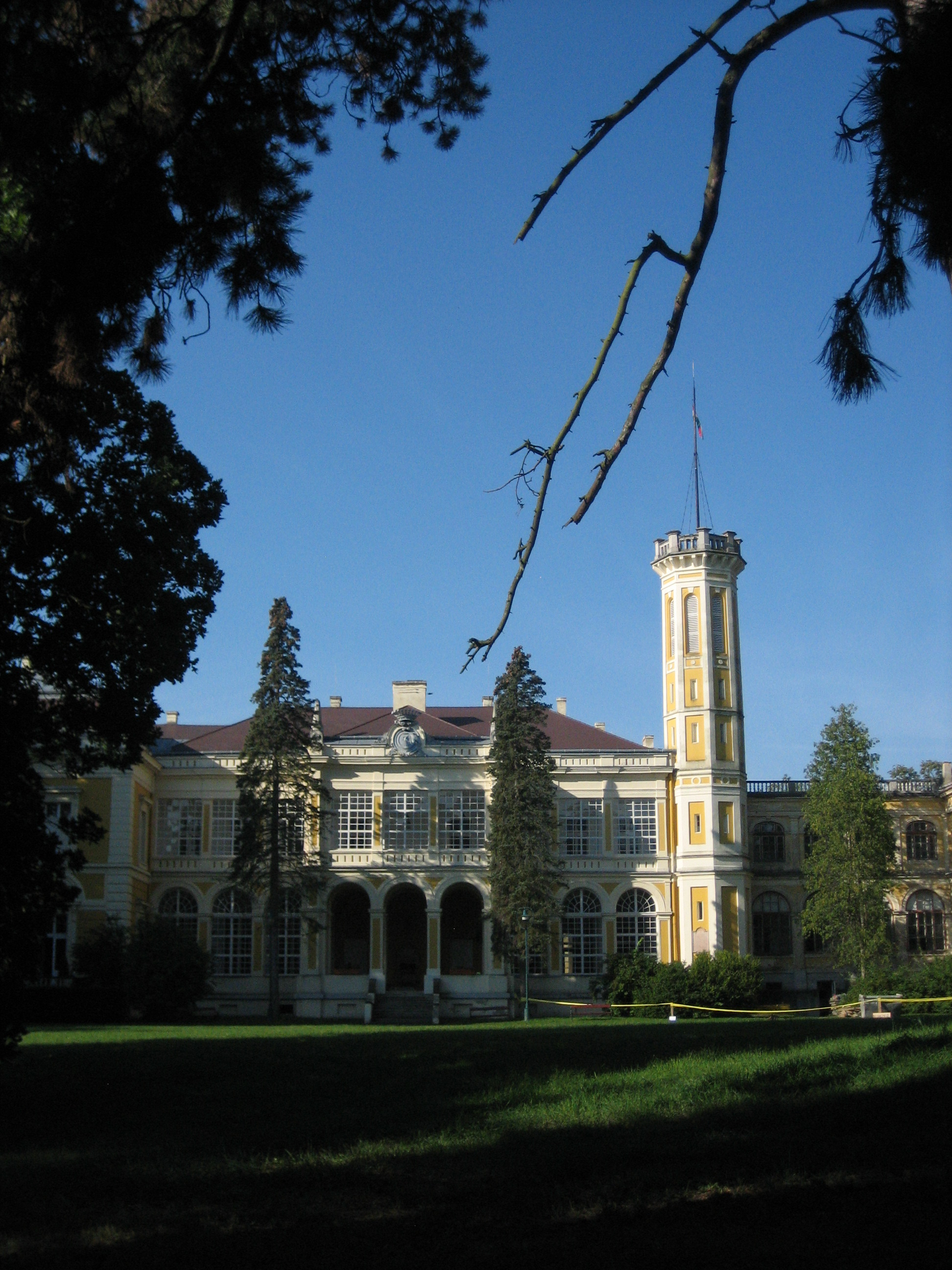 Füzérradvány, Károlyi-kastély keleti homlokzata a toronnyal This is a photo of a monument in Hungary. Identifier: 2768